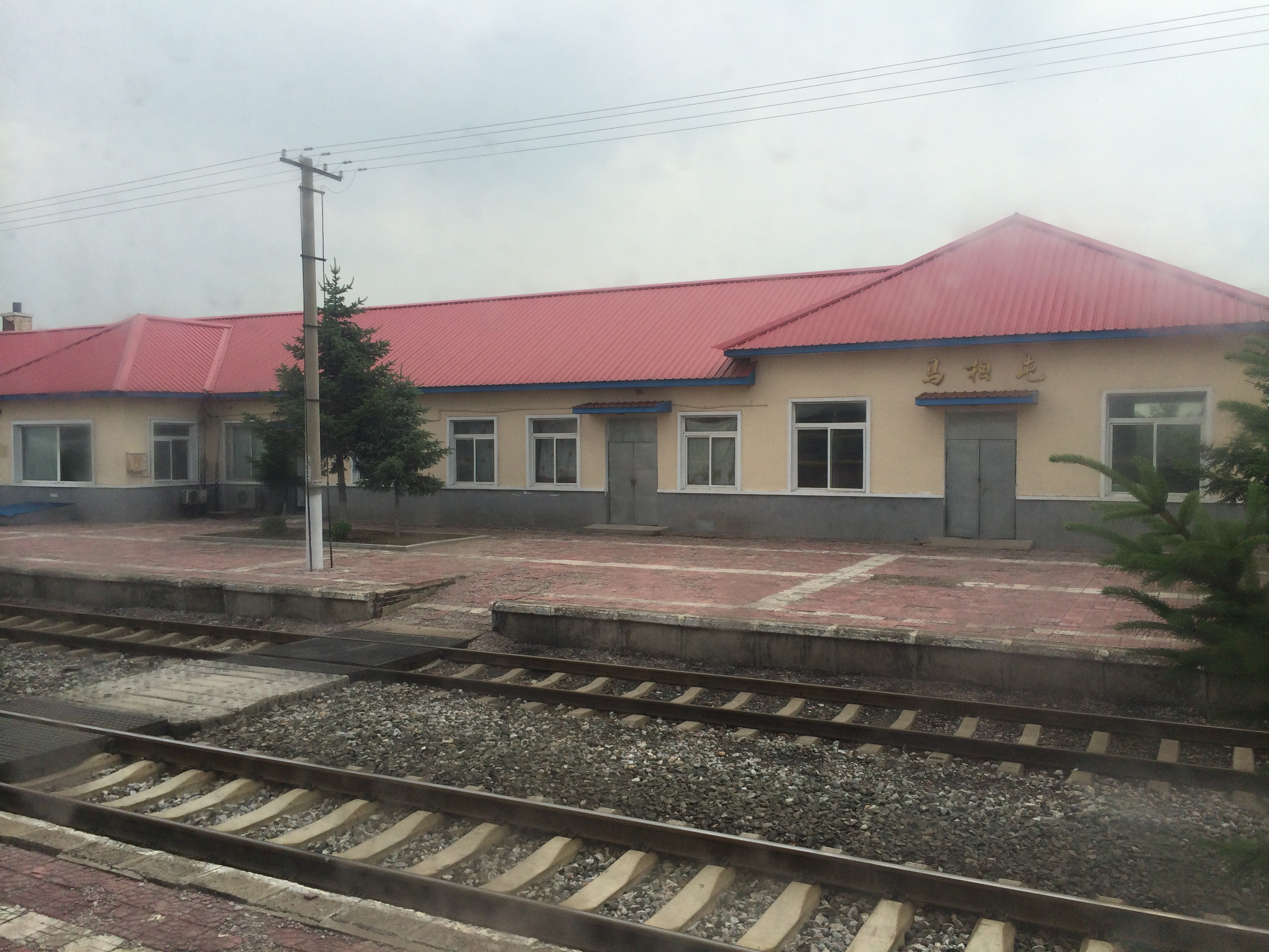 马相屯站站房外景